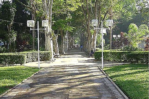 corredor de árvores da praça de Campo Belo